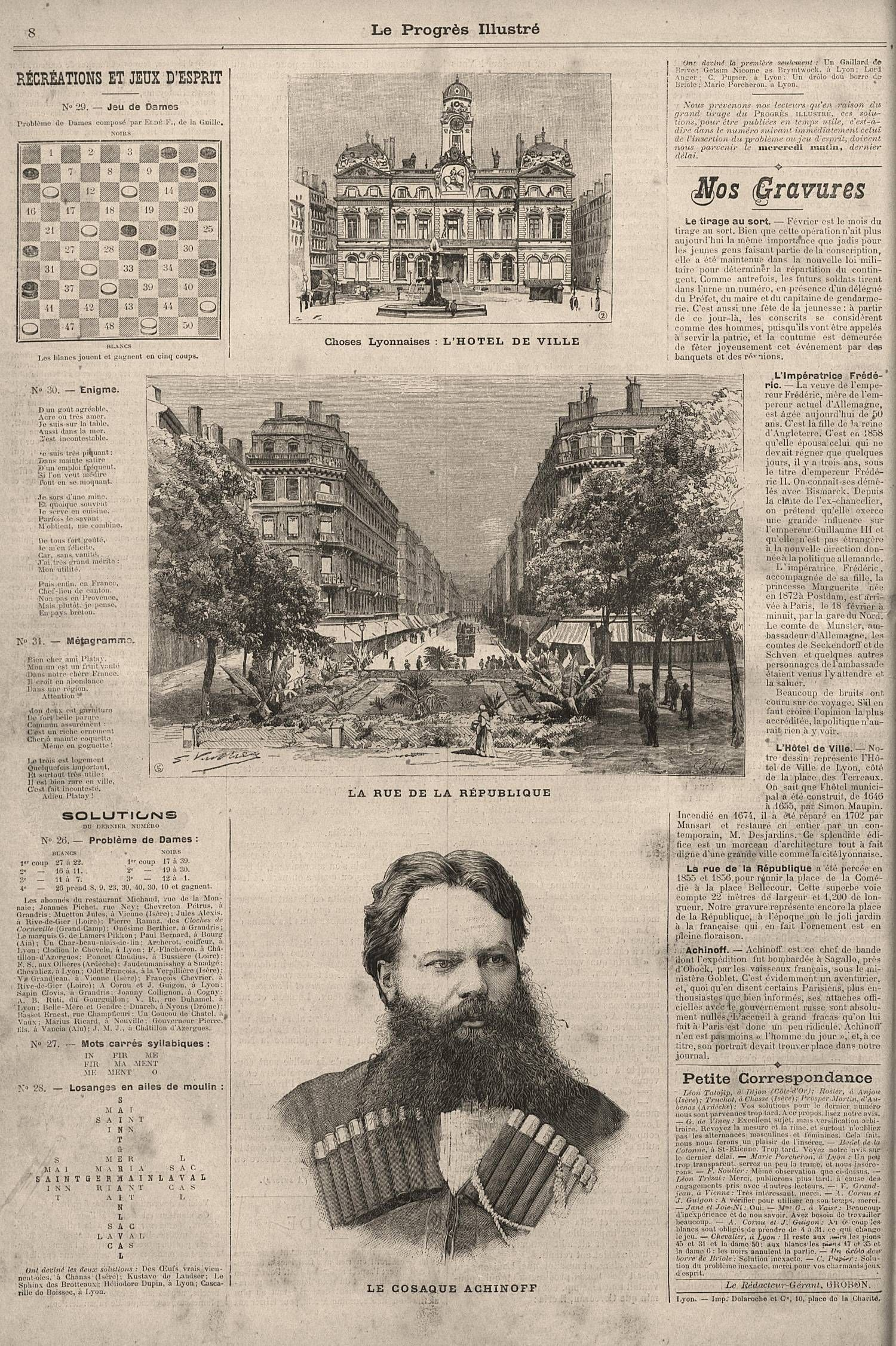 "Le Progrès Illustré" 01 mars 1891, page. Le cosaque Achinoff Somalia expedtiton information.